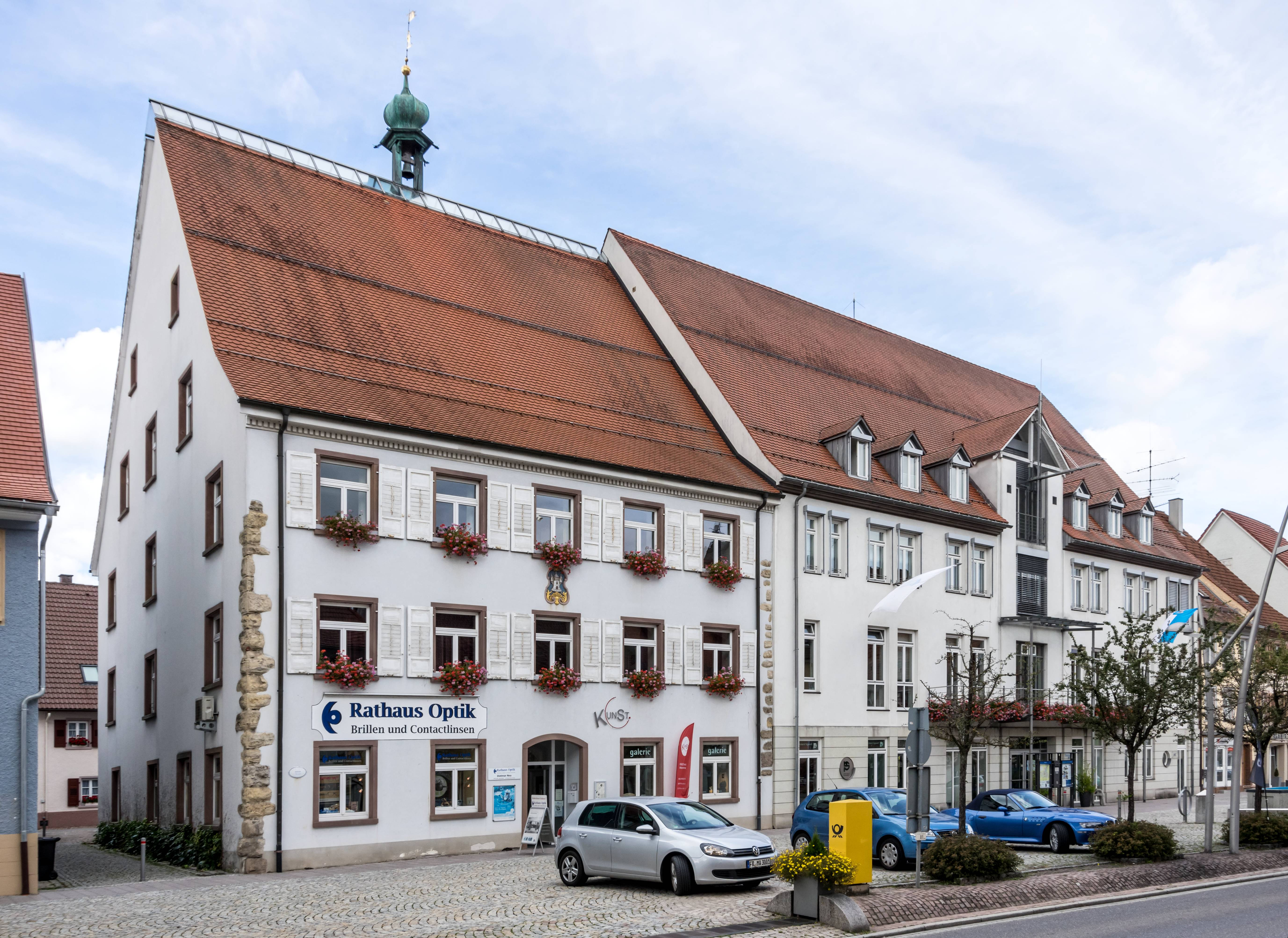 Bilder aus Bräunlingen